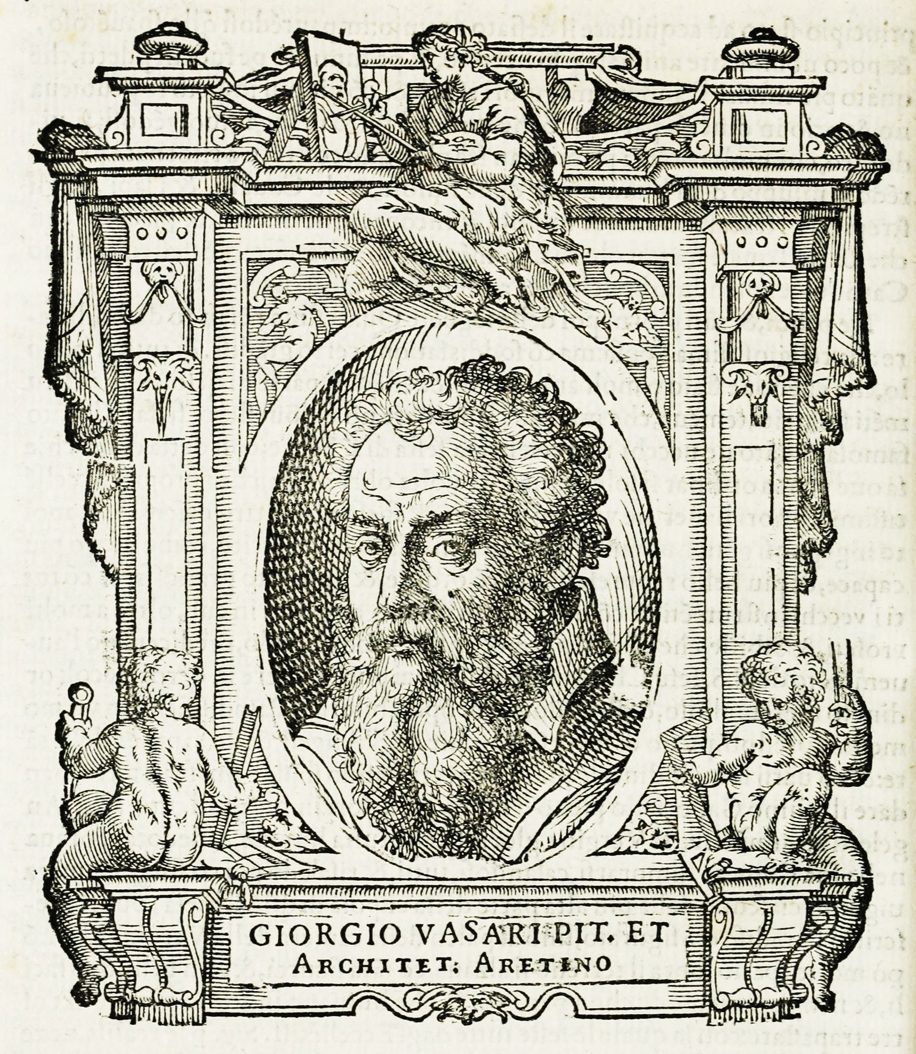 Illustratio from "Le Vite" by Giorgio Vasari, edition of 1568. Here, Giorgio Vasari himself.